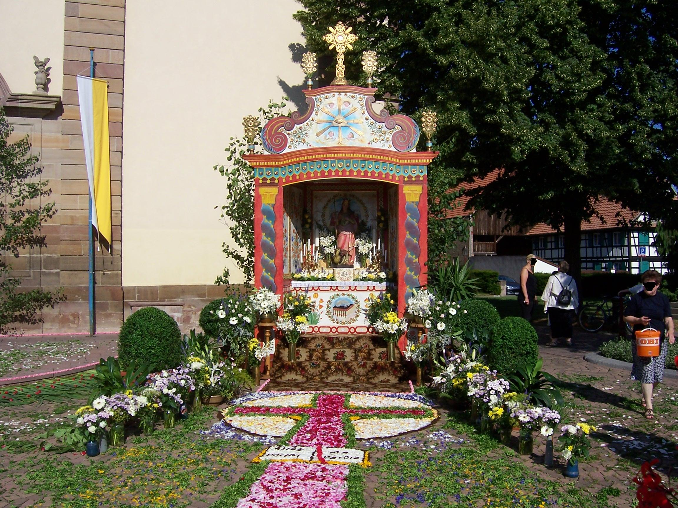 Fronleichnam in Geispolsheim/Elsass